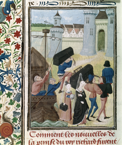 enluminure des Chroniques de Froissart